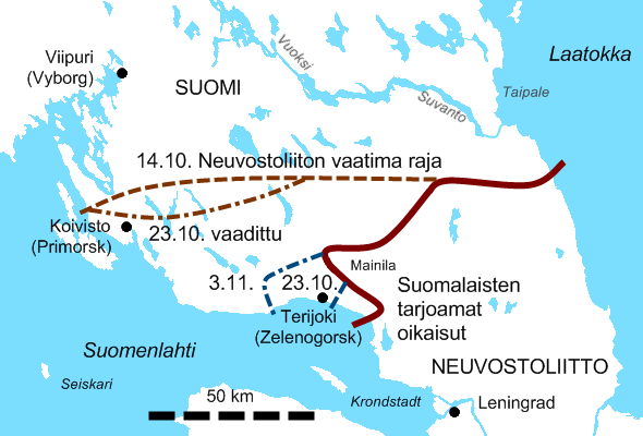 Talvisodan alla käytiin neuvotteluita Karjalan kannaksen rajoista. Neuvostoliitto esitti asiasta vaatimuksensa 14.10.1939, johon Suomi esitti vastaehdotuksen 23.10. Neuvostoliitto esitti uuden vaatimuksen 23.10., johon Suomi esitti uuden vastaehdotuksen 3.11. Neuvostoliitto vaati lisäksi kannaksen puolustuslinnnakkeiden tuhoamista.